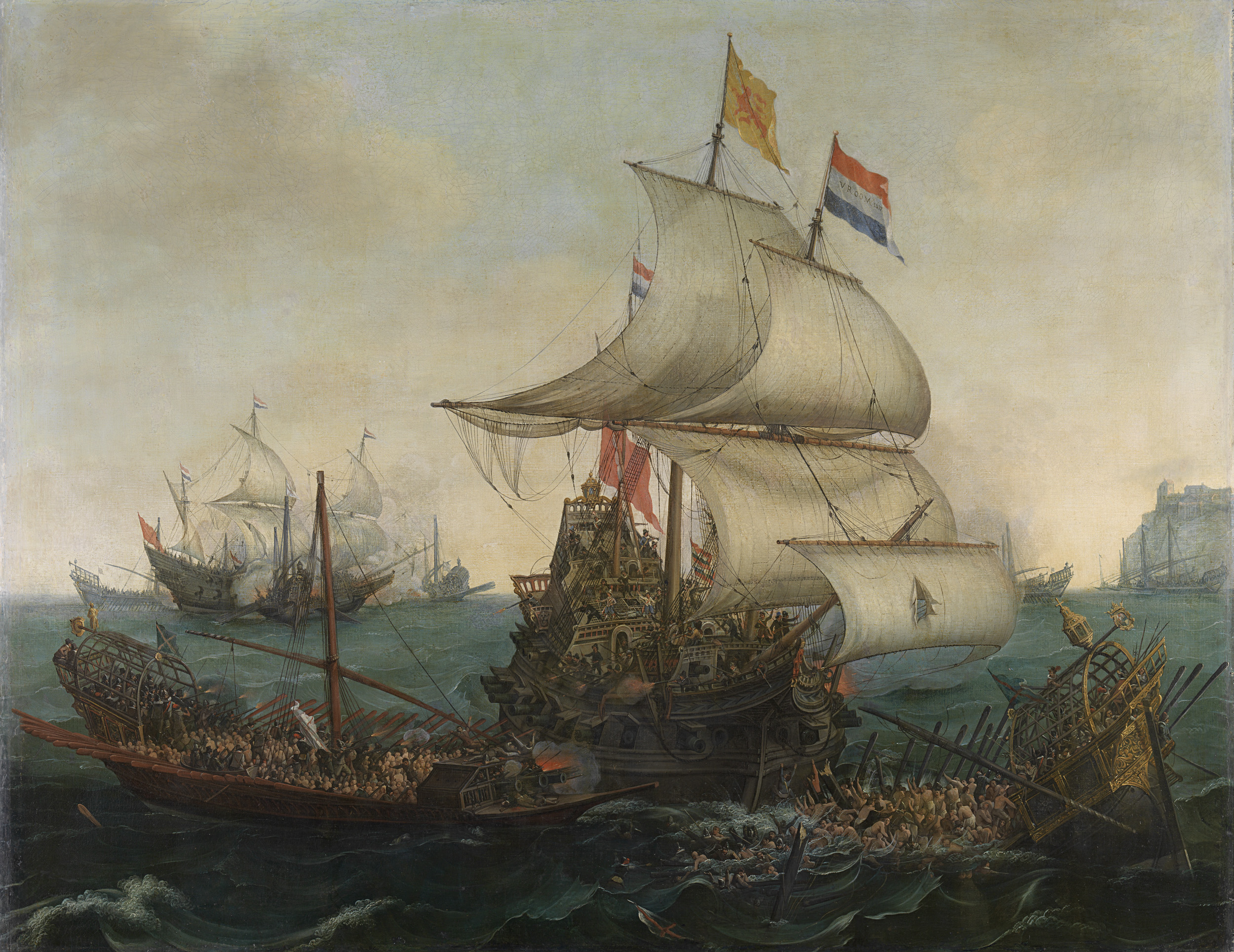 Hollandse schepen overzeilen Spaanse galeien onder de Engelse kust, 3 oktober 1602. Zeeslag waarbij Hollandse oorlogsschepen de Spaanse galeien rammen, op de achtergrond een ander Nederlands fregat.